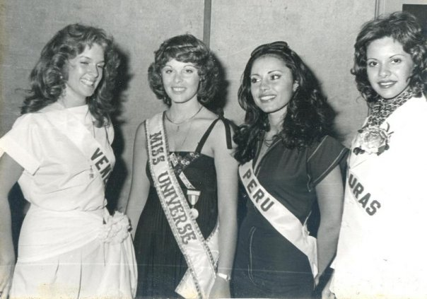 Miss Universo 1977